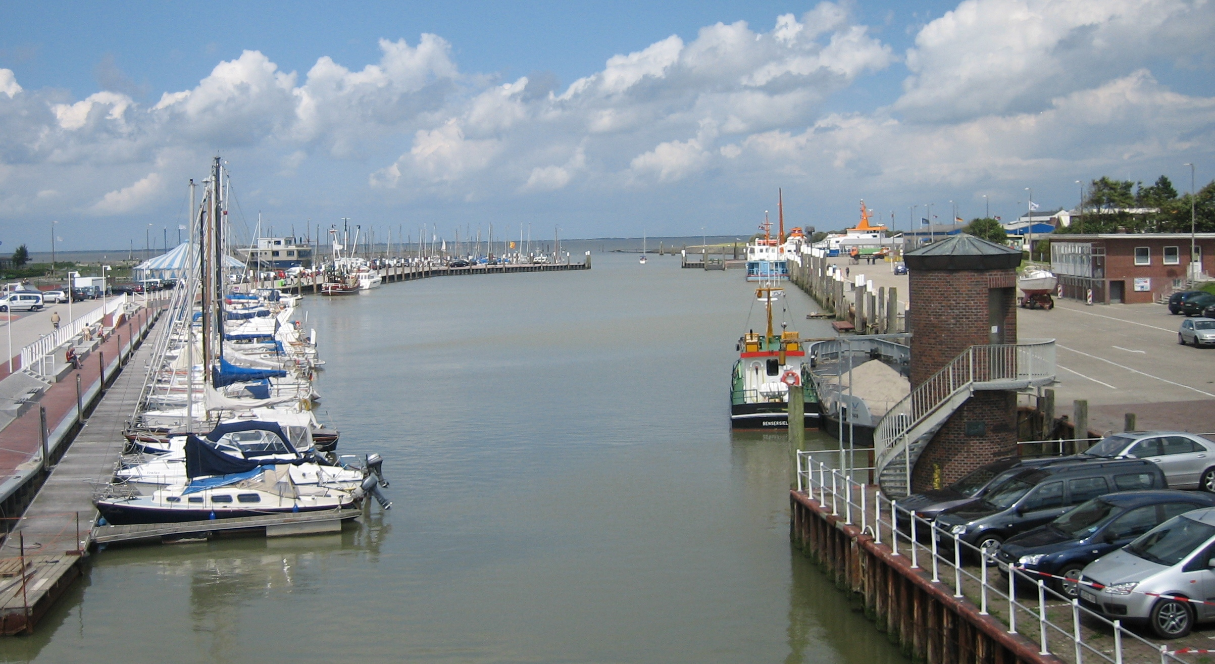 Bensersiel, Ostfriesland: Hafen (mit Fähre zur Insel Langeoog) Bensersiel, East Frisian Lands: Port and ferry to Isle of Langeoog